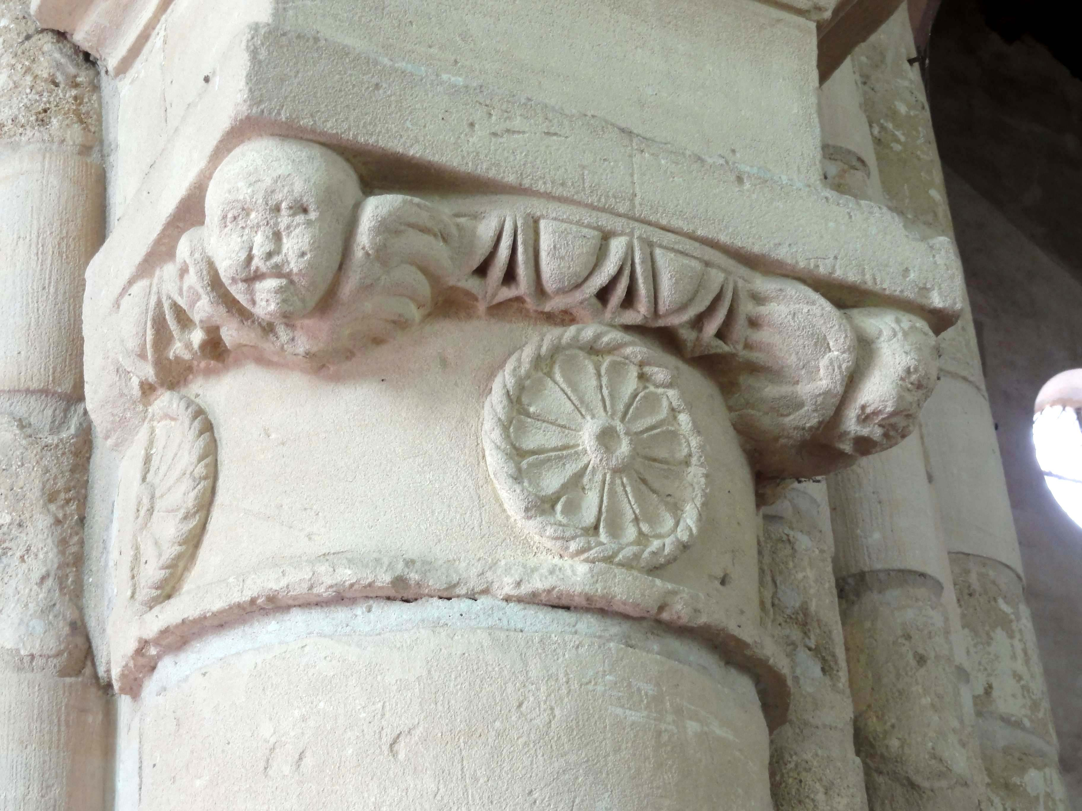 Chapiteau(x) de l'église - voir titre.